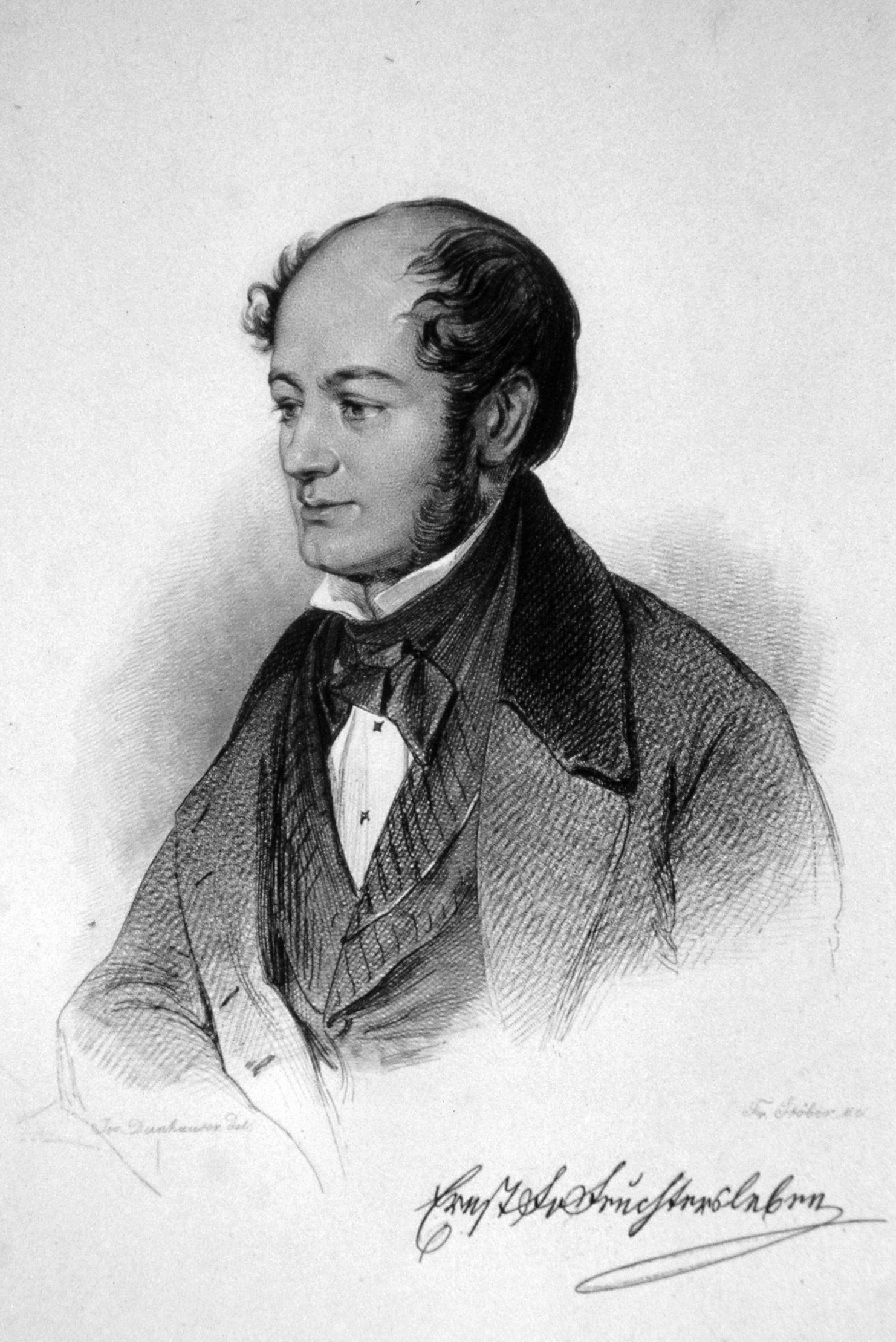 Ernst von Feuchtersleben, Porträtstich von Stöber nach einer Zeichnung von Josef Danhauser